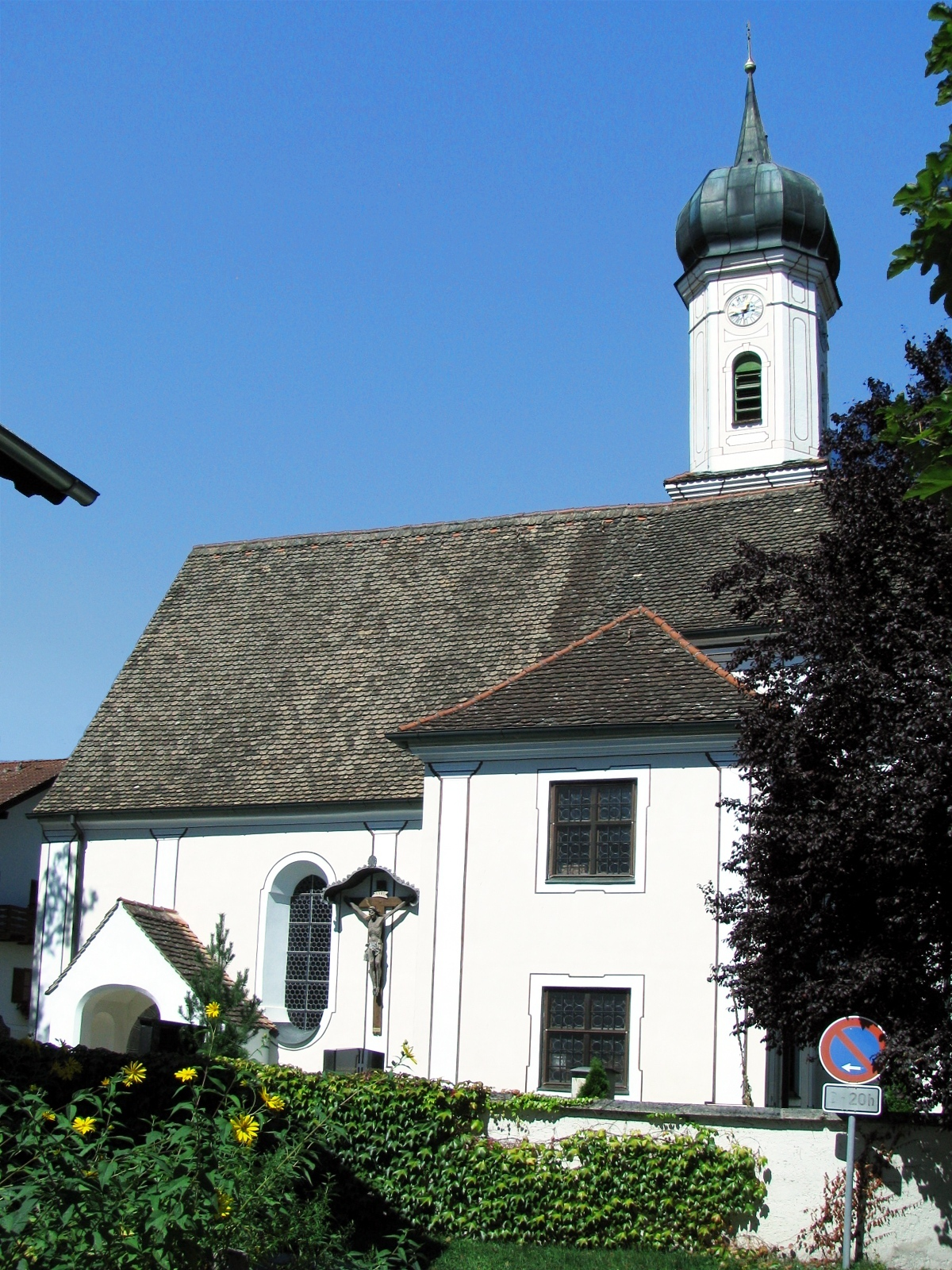 Kath. Kirche St. Leonhard in Bauerbach, Gemeinde Wielenbach; im Kern 1548, Langhaus 1709 barockisiert, Chor 1735/36 wohl von Joseph Schmuzer; mit Ausstattung; Friedhofsmauer mit starken Deckplatten aus Tuffstein, 18./19. Jh. This is a photograph of an architectural monument.